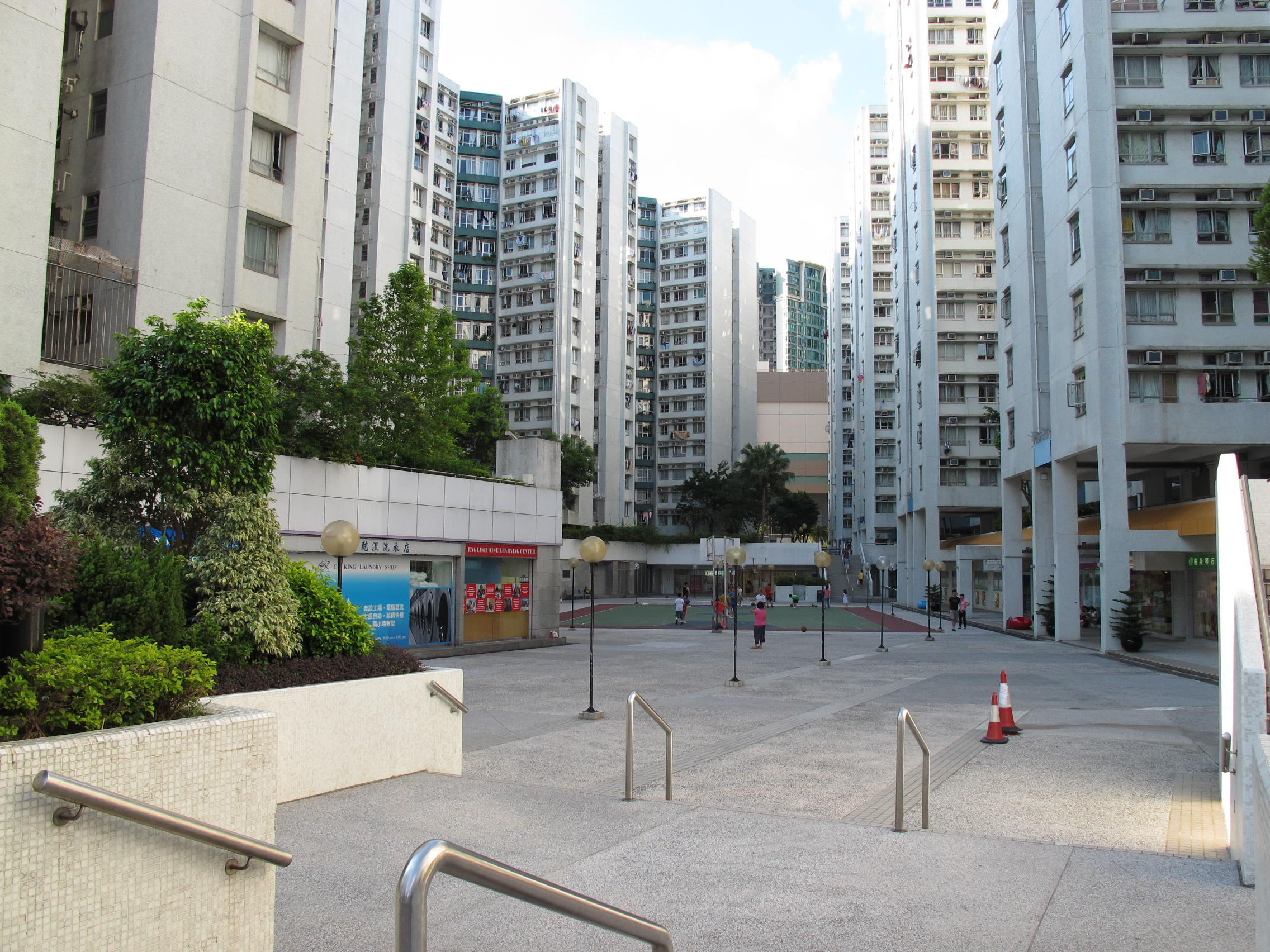 Whampoa Garden Banyan Mansions